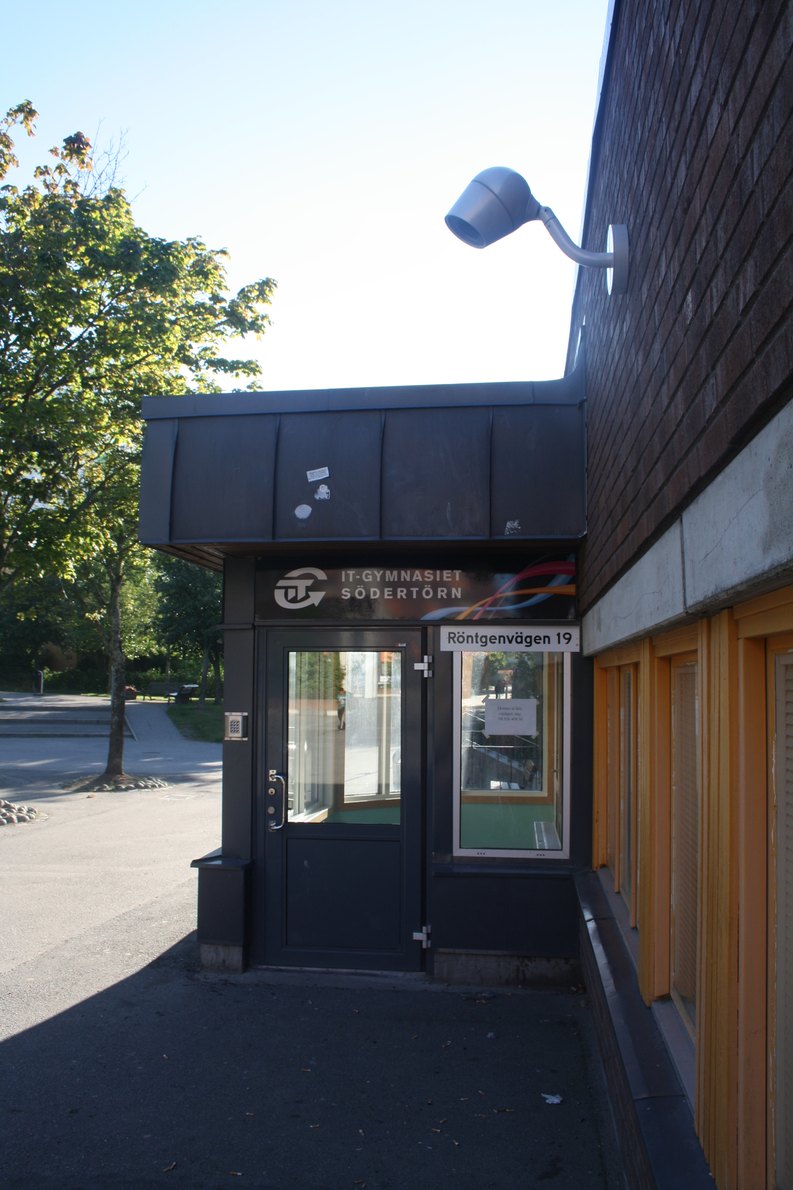 IT gymnasiet Södertorn augusti 2016